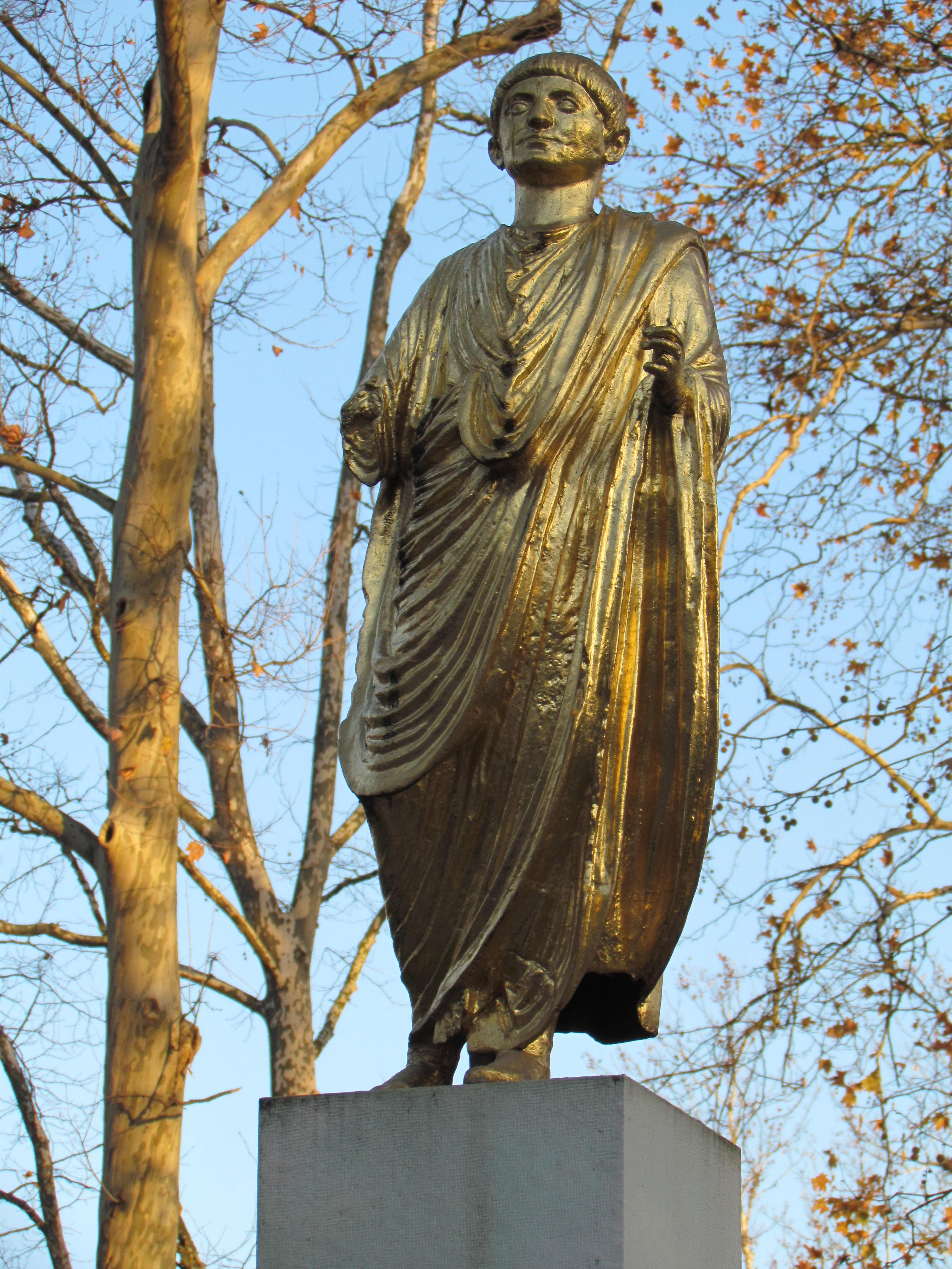 Opis: Replika kipa emonskega patricija, imenovanega Emonec, v parku Zvezda v Ljubljani; original je v Narodnem muzeju Slovenije.